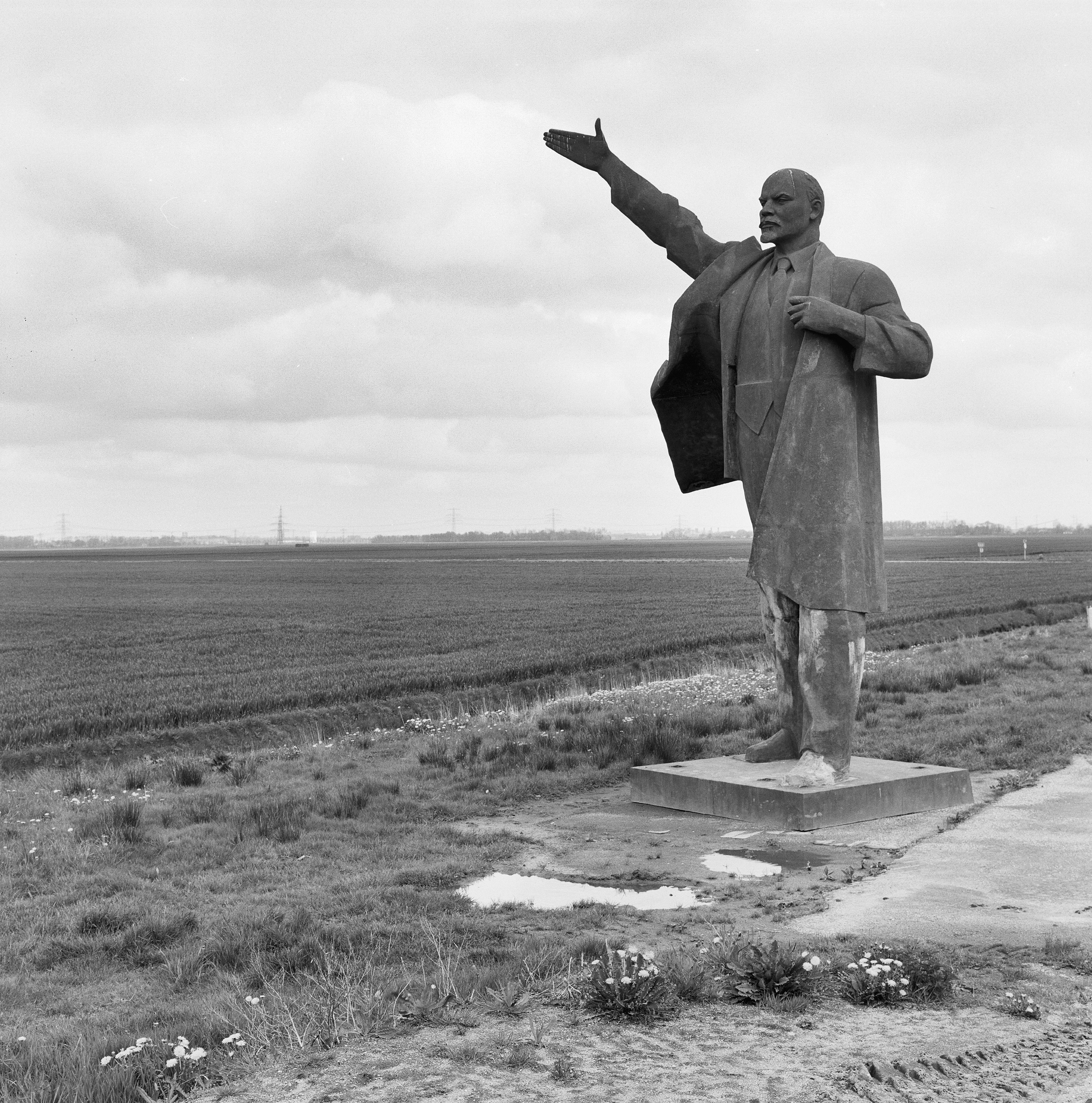 Standbeeld/ Beeld: Aanzicht Leninbeeld met omgeving (opmerking: Gefotografeerd voor Monumenten In Nederland Groningen)